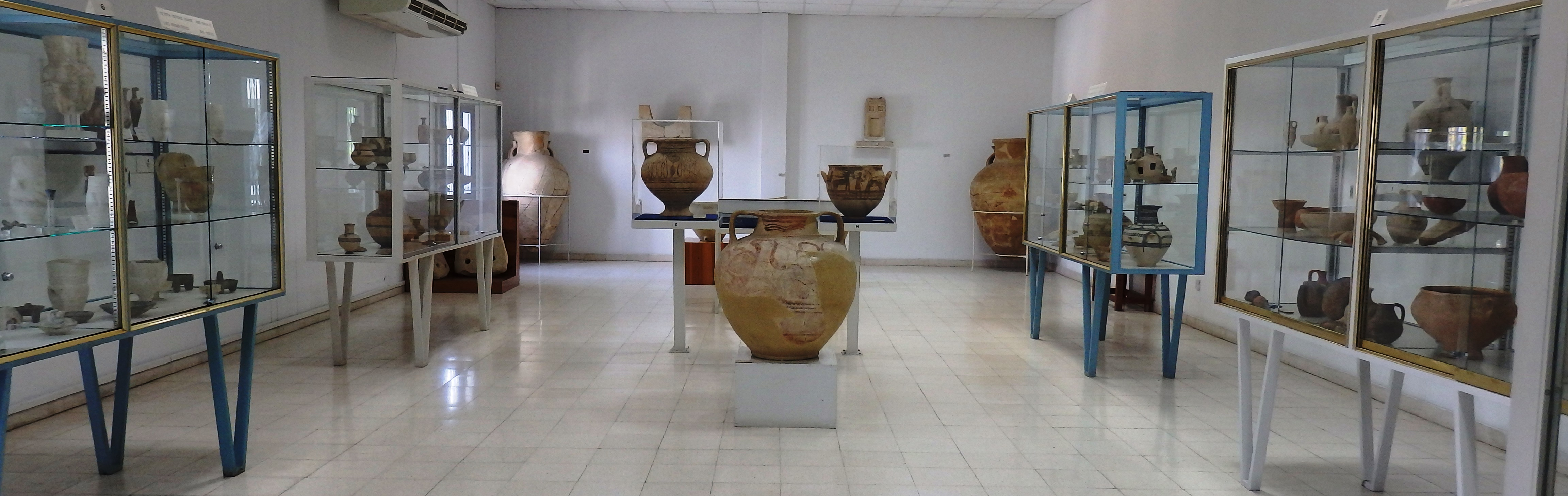 Ausstellungssaal Archäologisches Museum Larnaka